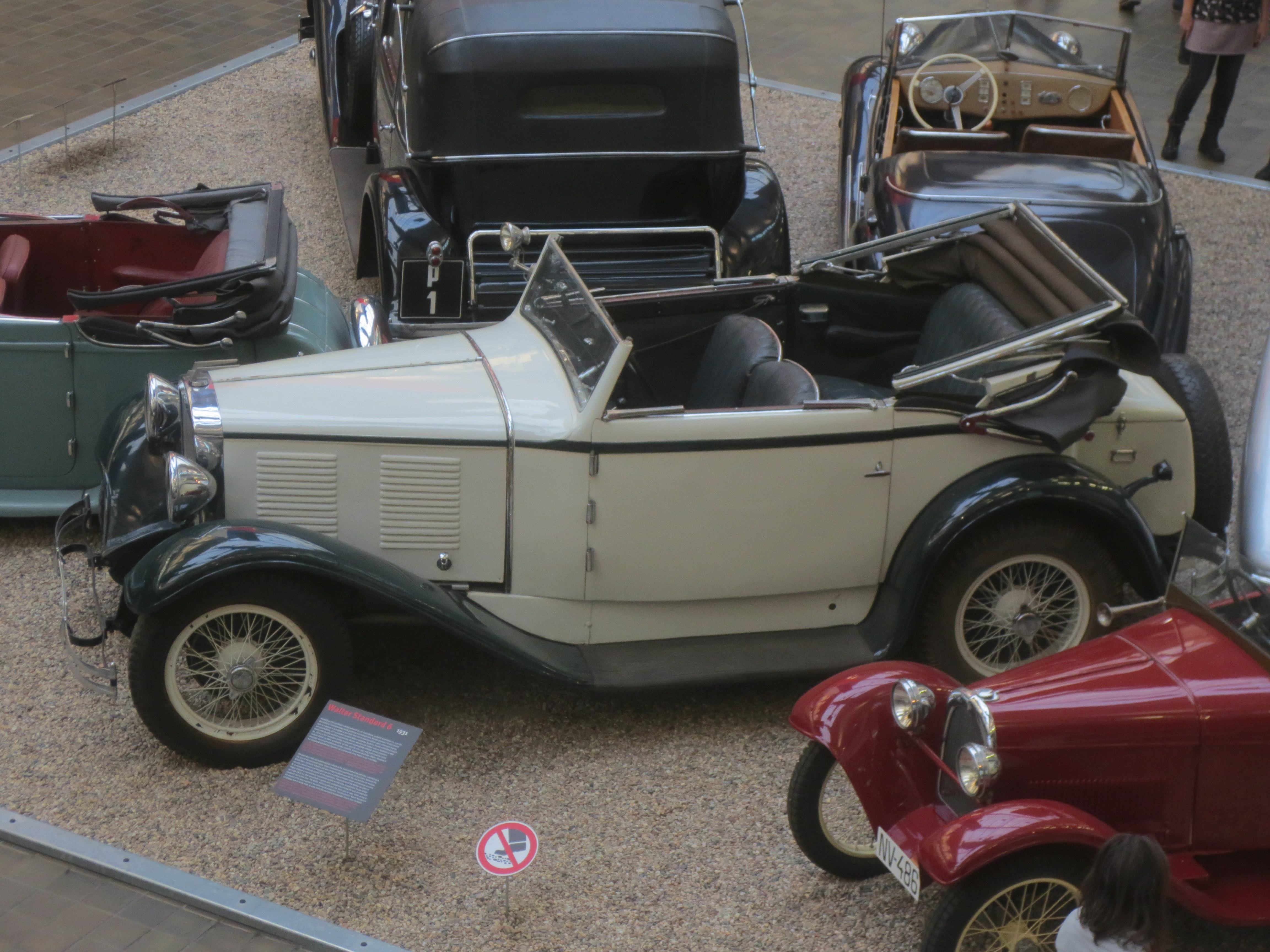 Walter Standard 6 (1931) v hale NTM 2018